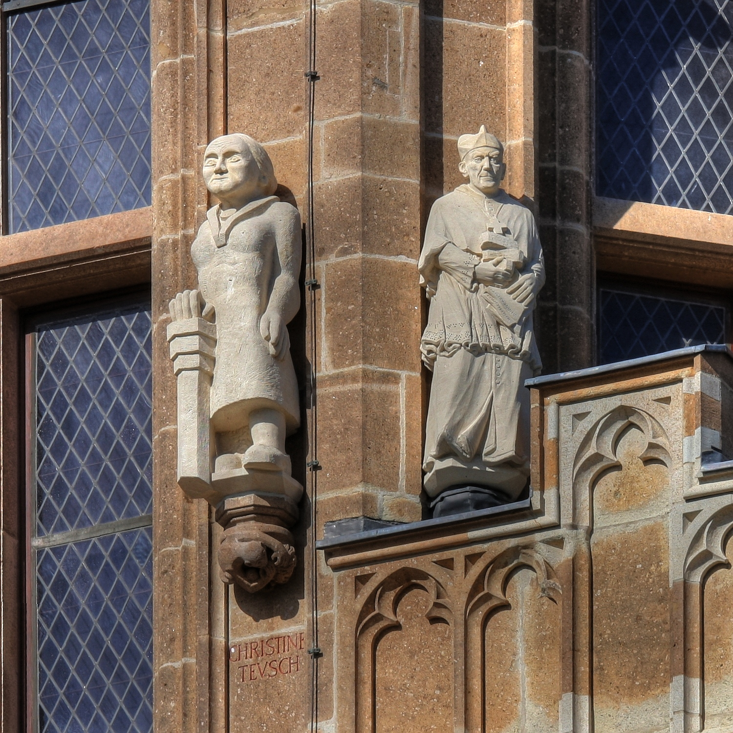 Rathausturm Köln mit den Figuren des Christina Teusch und Kardinal Joseph Frings Details zu der Statue: Bildhauer der Teusch-Statue: Klaus Kampert Bildhauer der Frings-Statue: Elmar Hillebrand Details zu der Konsole: Thema der Konsole unter der Teusch-Statue: „Mich laust der Affe“. Bildhauer: Herbert Rausch Die Konsole unter der Frings-Statue hat kein Thema.